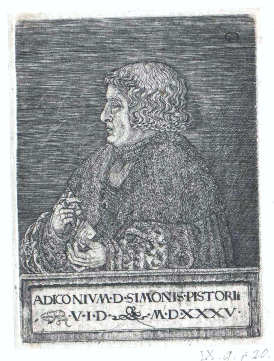 Scan eines Kupferstiches aus dem Bildarchiv Austria